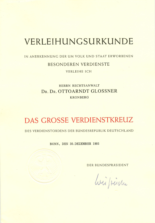 Am 30. Dezember 1993 erhielt Rechtsanwalt Dr. Dr. Ottoarndt Glossner das Große Bundesverdienstkreuz, verliehen durch den Bundespräsidenten Richard von Weizsäcker, stellvertretende Übergabe durch Frau Dr. Sabine Leutheusser-Schnarrenberger in Bonn.